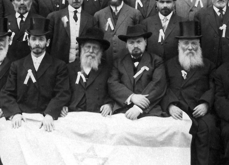 הרב דובר אברמוביץ כנשיא תנועת המזרחי בארצות הברית עם הרב מאיר בר אילן